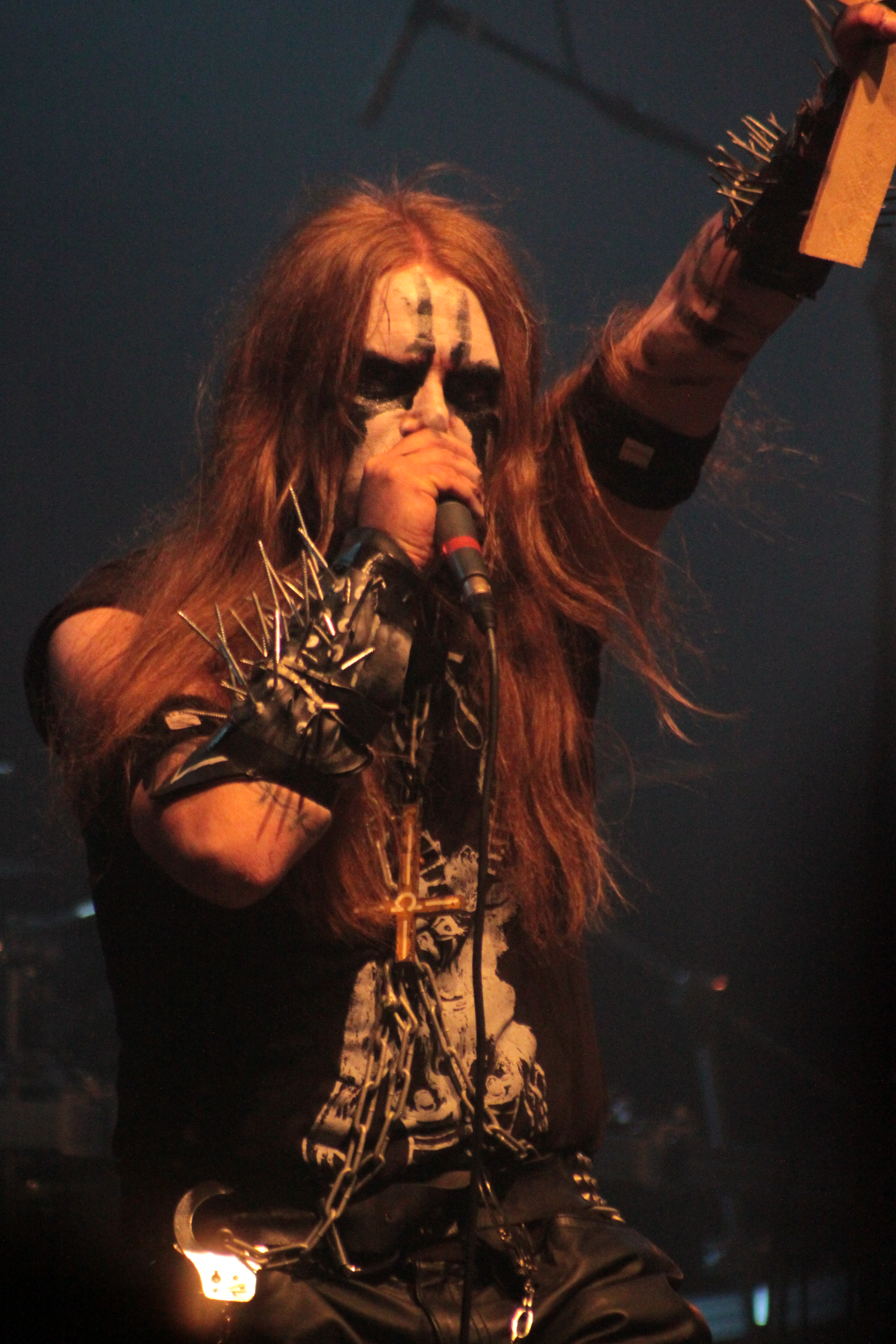 R. Nattefrost, Carpathian Forest, Helfest 2013, Fr-44-Clisson.